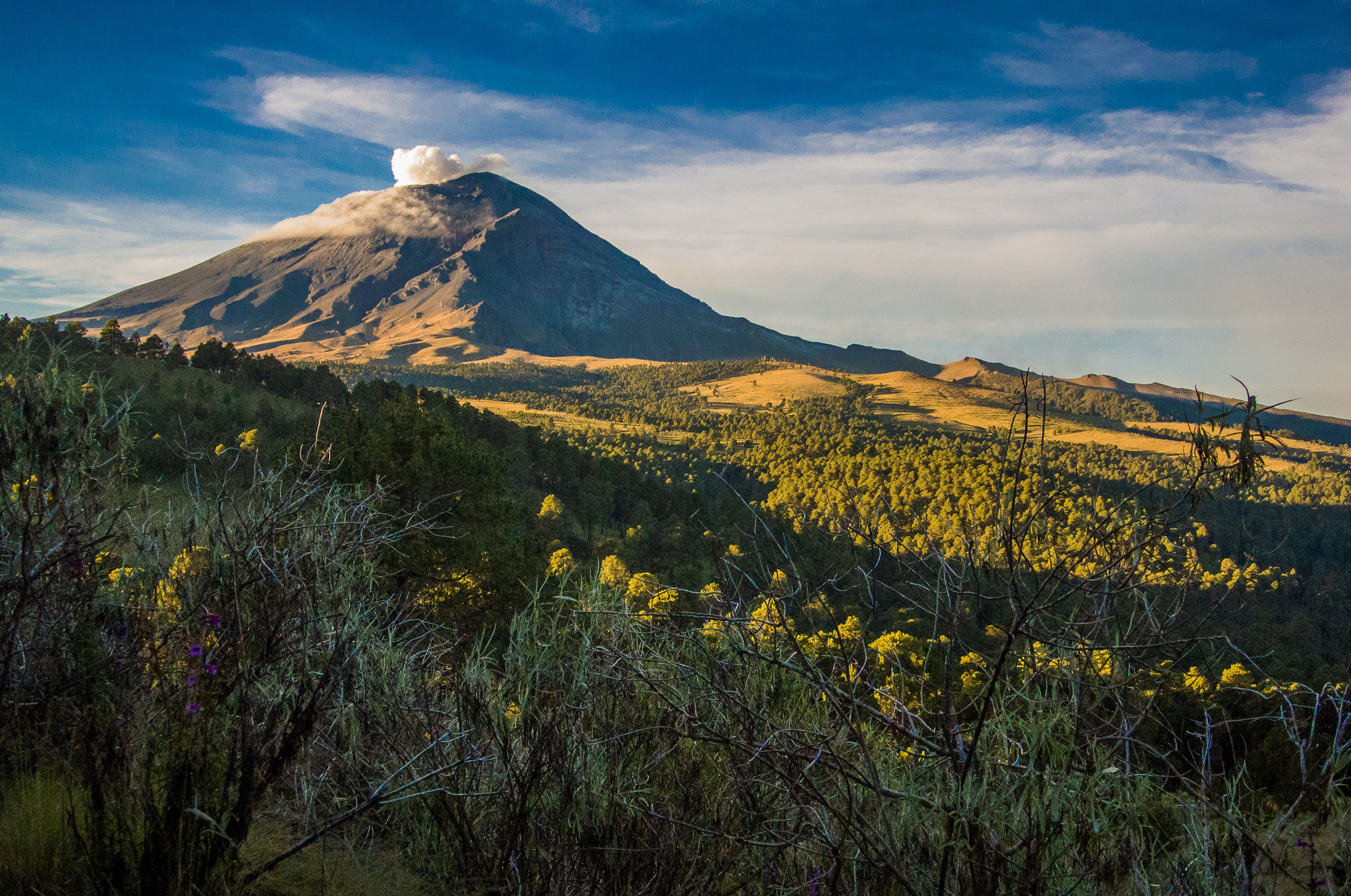 Iztaccihuatl, méxico, mañana